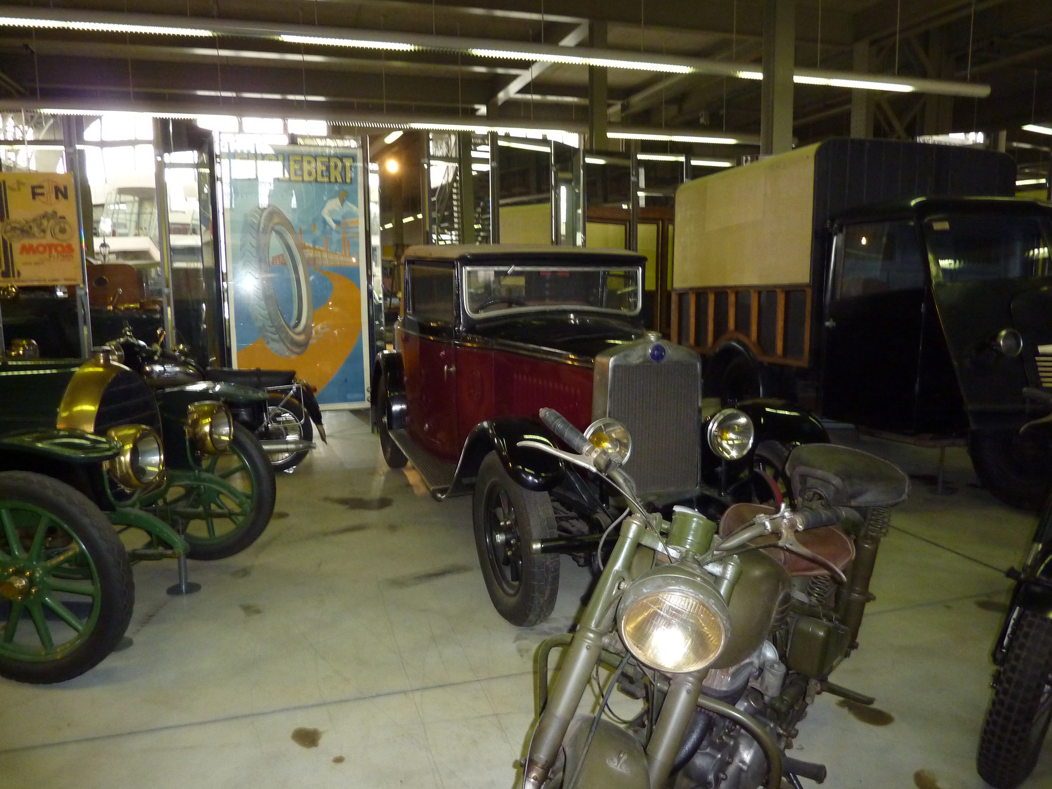 FN 1930 Type 1400 à l'Autoworld de Bruxelles.